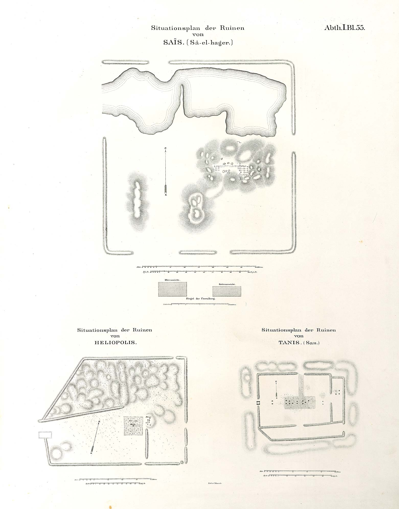 Denkmaeler aus Aegypten und Aethiopien nach den Zeichnungen der von Seiner Majestät dem Koenige von Preussen, Friedrich Wilhelm IV., nach diesen Ländern gesendeten, und in den Jahren 1842–1845 ausgeführten wissenschaftlichen Expedition auf Befehl Seiner Majestät